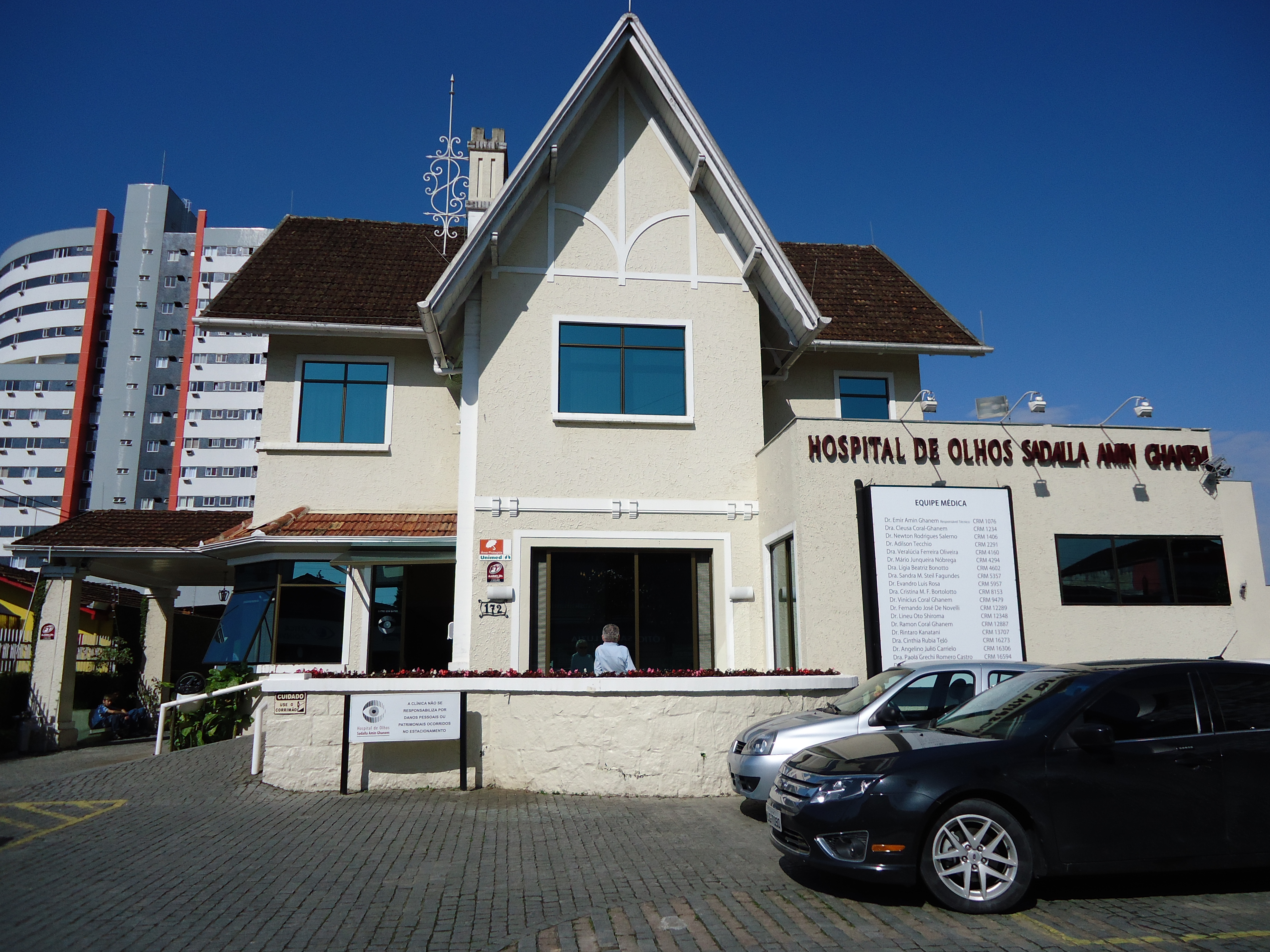 Hospital de Olhos Sadalla Amin Ghanem, Joinville, Santa Catarina, Brasil Experiência acumulada em 74 anos de história, médicos oftalmologistas especialistas e uma estrutura privilegiada elevam o Hospital de Olhos Sadalla Amin Ghanem a um centro nacional de referência em oftalmologia. Recebemos anualmente milhares de pacientes do Brasil e Exterior, em busca de especialistas reconhecidos e equipamentos de última geração para tratamentos que impactem na melhora da sua visão e qualidade de vida.